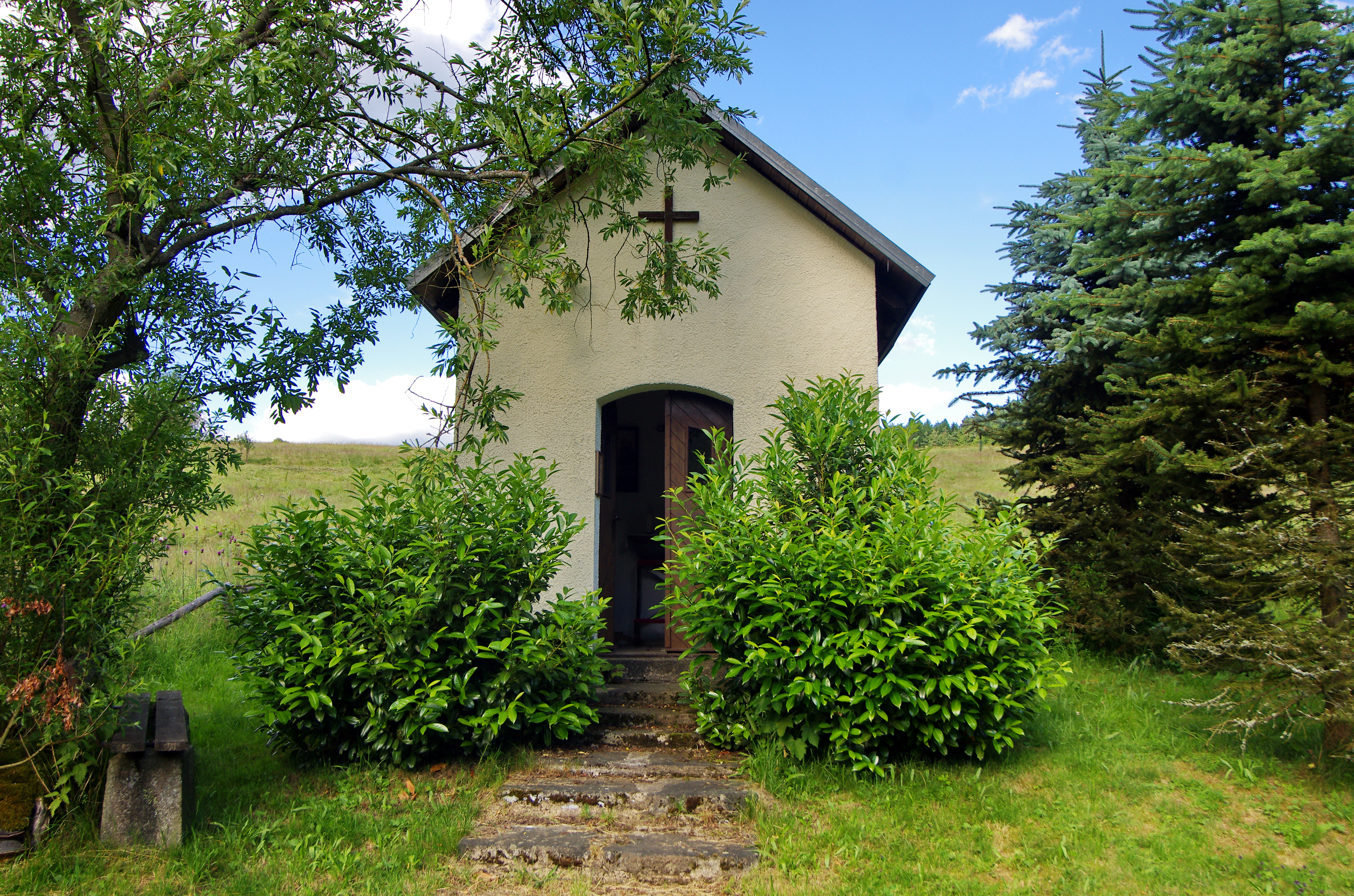 Počátky, část obce Kraslice, kaple Svatých pomocníků, okres Sokolov